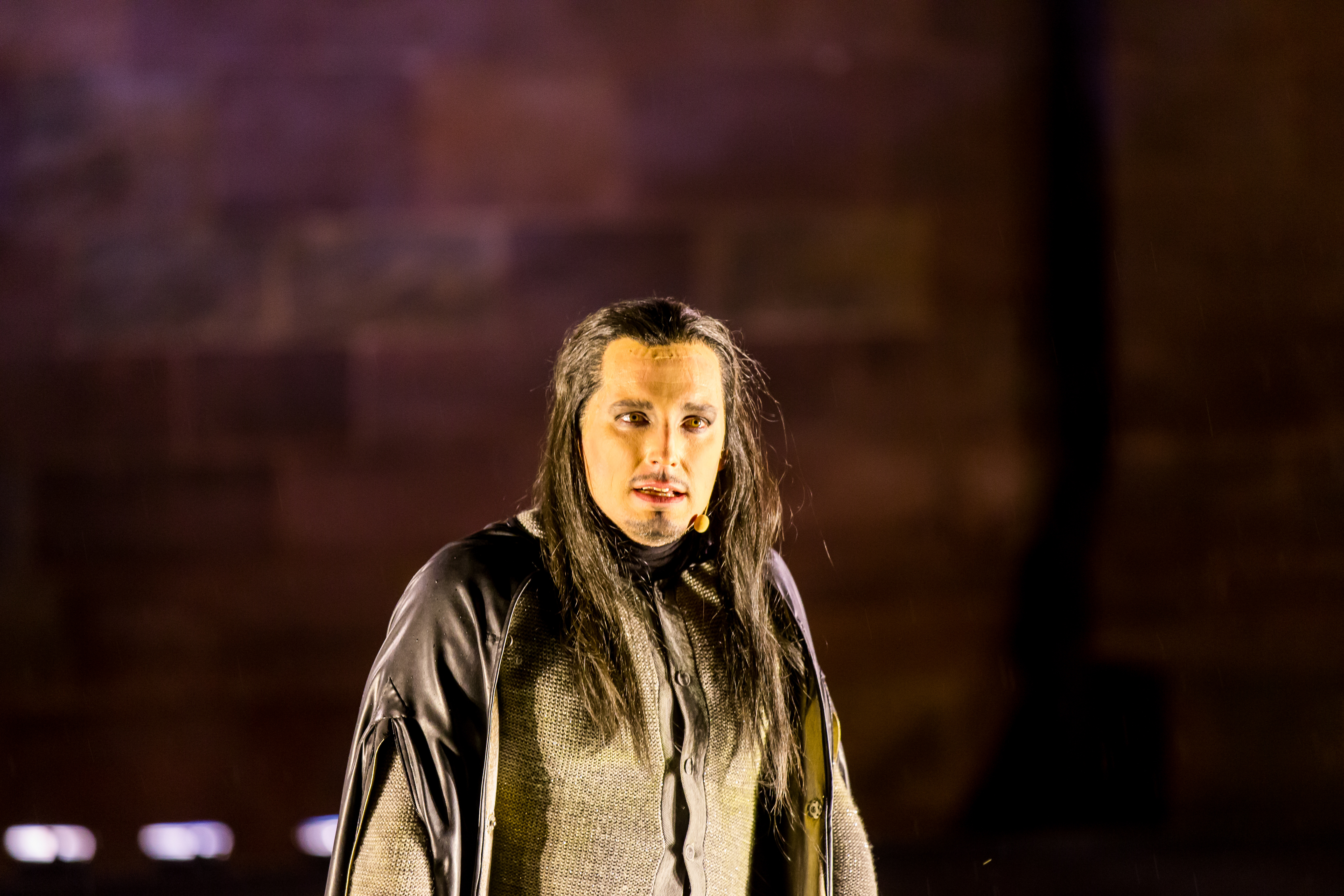 Nibelungenfestspiele Worms Gemetzel 2015 Nordseite Wormser Kaiserdom Nico Hofmann (Intendant), Albert Ostermaier (Autor), Thomas Schadt (Regisseuer) Enemble: Alina Levshin (Ortlieb), Maik Solbach (Narr), Judith Rosmair (Kriemhild), Catrin Striebeck (Brünhild), Markus Boysen (Etzel), Heiko Pinkowski (Dietrich), Max Urlacher (Hagen), Holger Kunkel (Gunter), Gabriel Raab (Gernot), Peter Becker (Giselher), Tom Radisch (Volker), Marion Breckwoldt (Zofe), Radu Cojocariu (Erzähler)